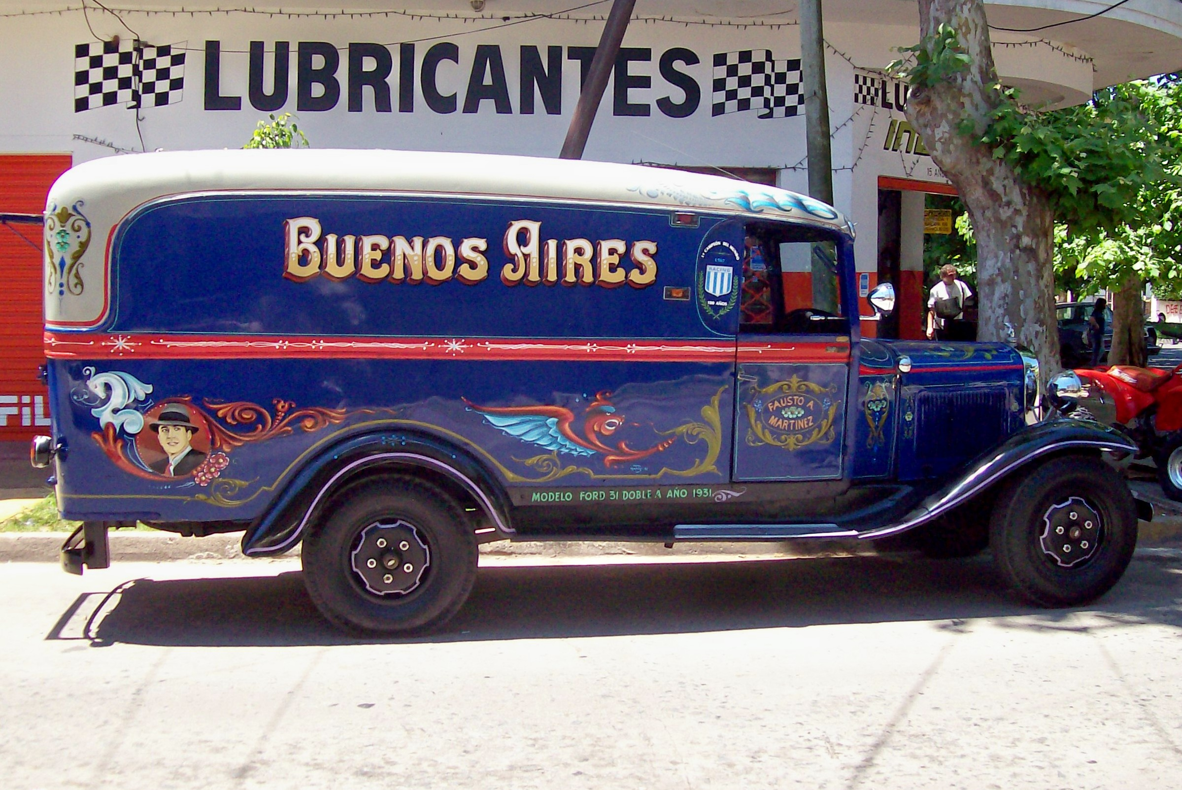 Camión Ford modelo 31 doble A, del año 1931 con Fileteado porteño, en Olivos, (Buenos Aires).